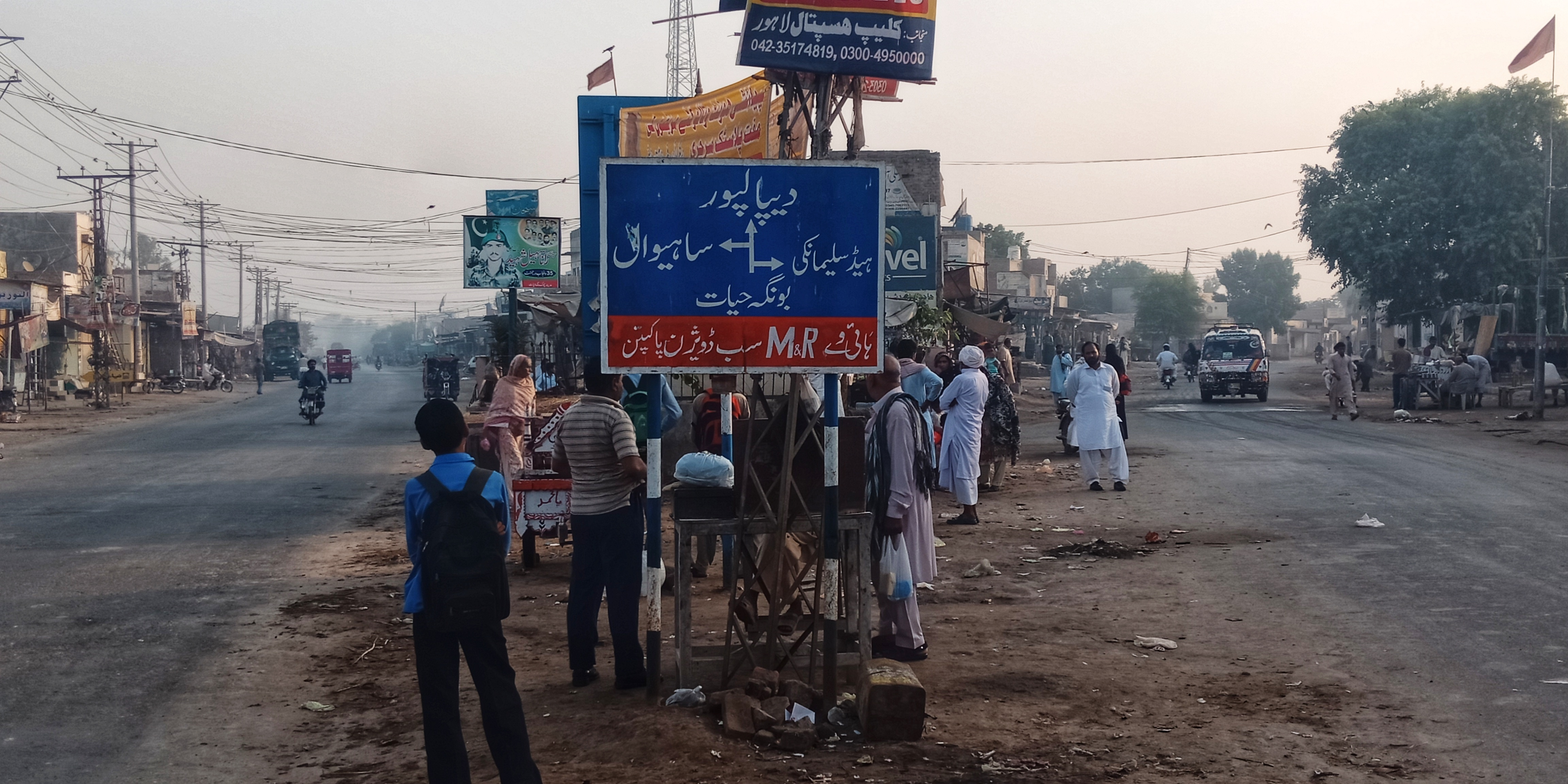 Madina Chowk, Adda Bunga Hayat